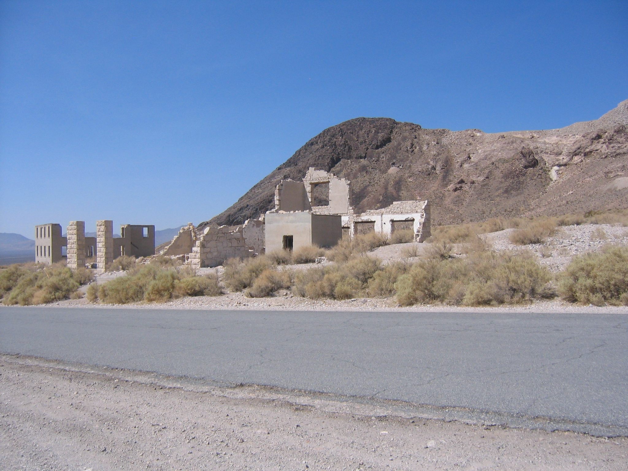 Rhyolite Golden Center